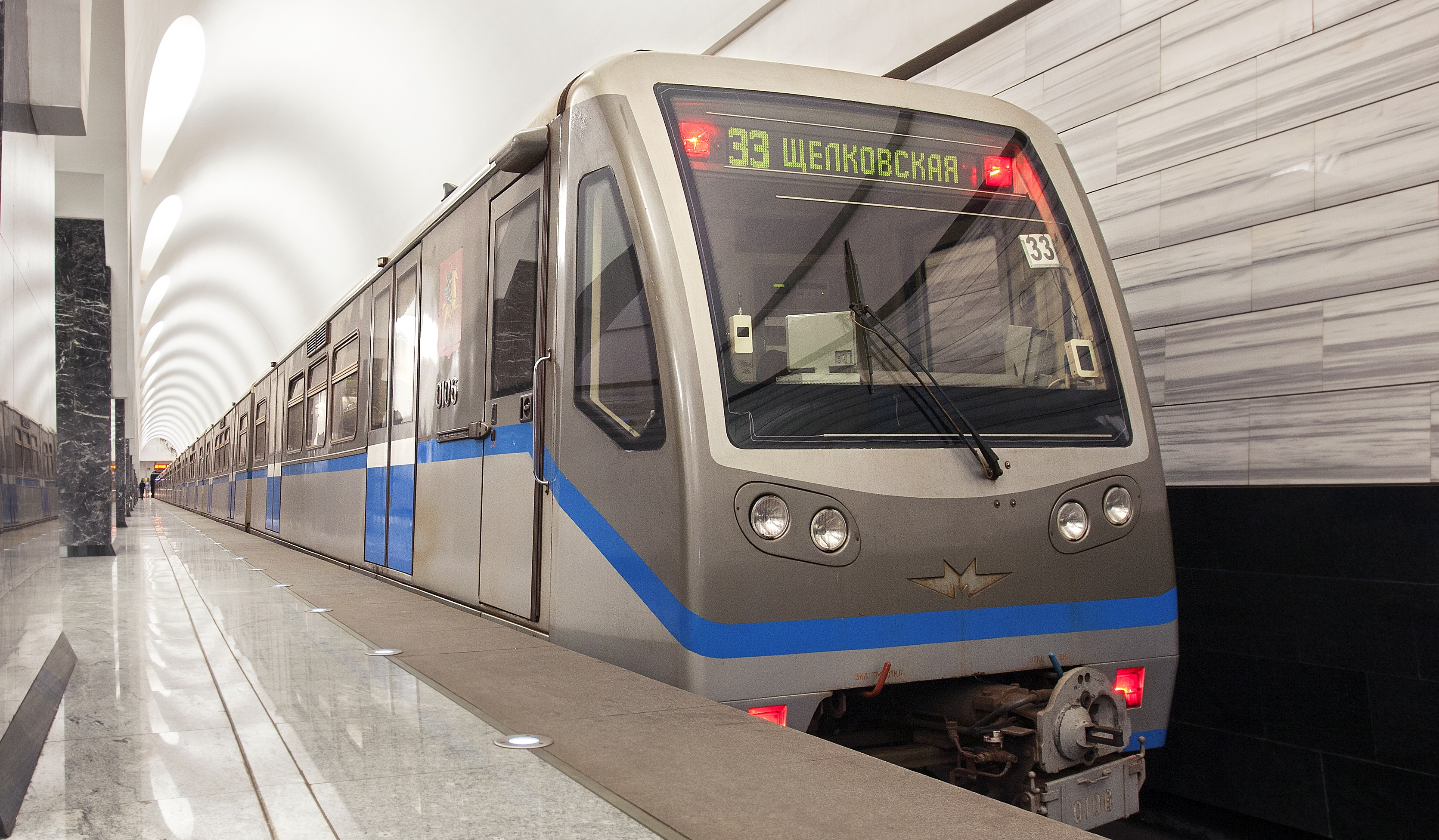 Поезд «Русич» на станции «Волоколамская»